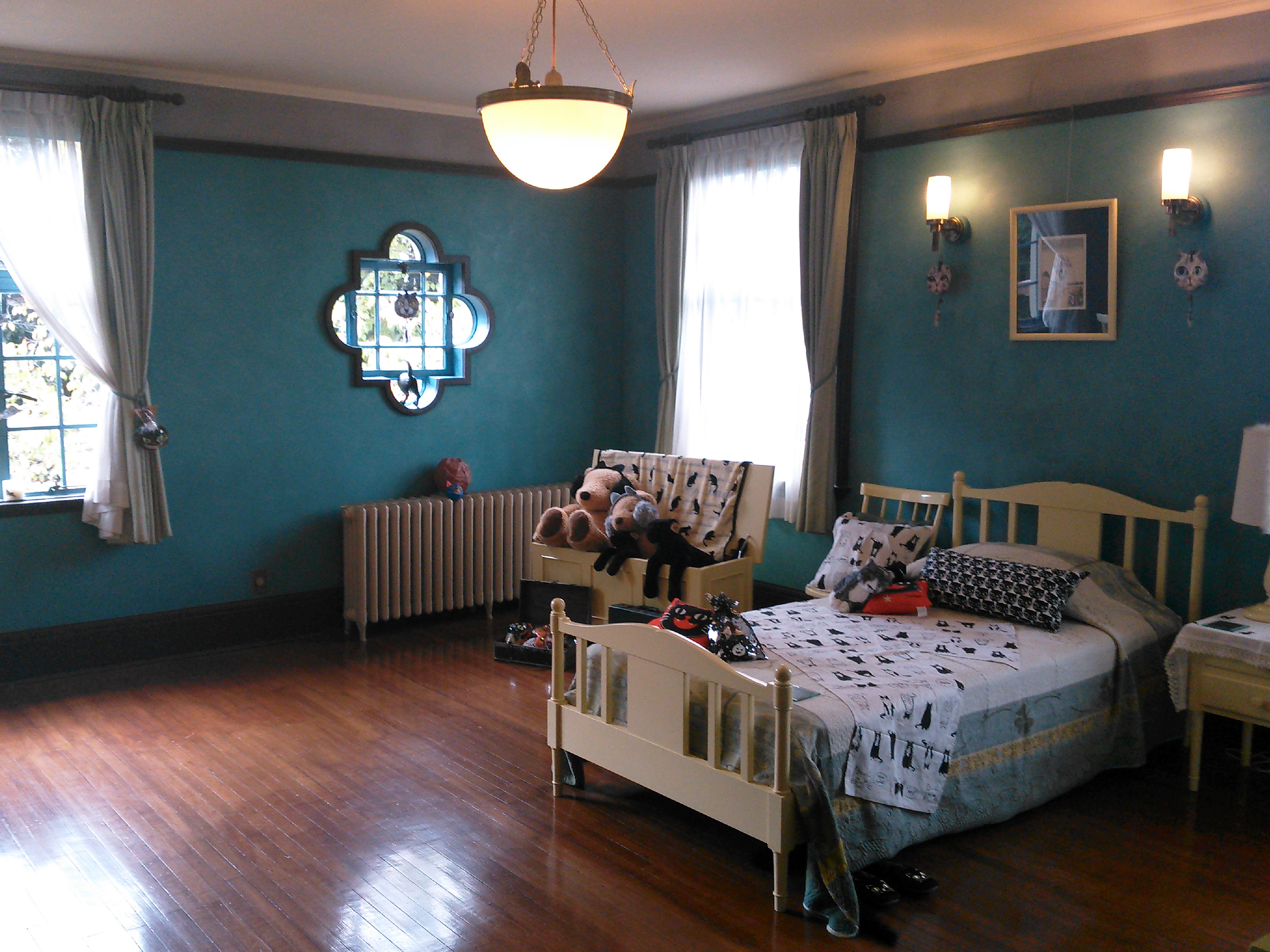 横浜・山手のベーリック・ホールの子供部屋